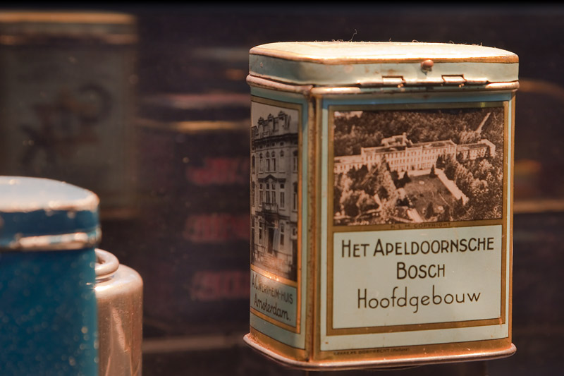 Collectebusje, 7647 ik heb speciaal gezocht naar het standpunt waarbij de weerspiegelig van de blikjes meegenomen kon worden in de foto